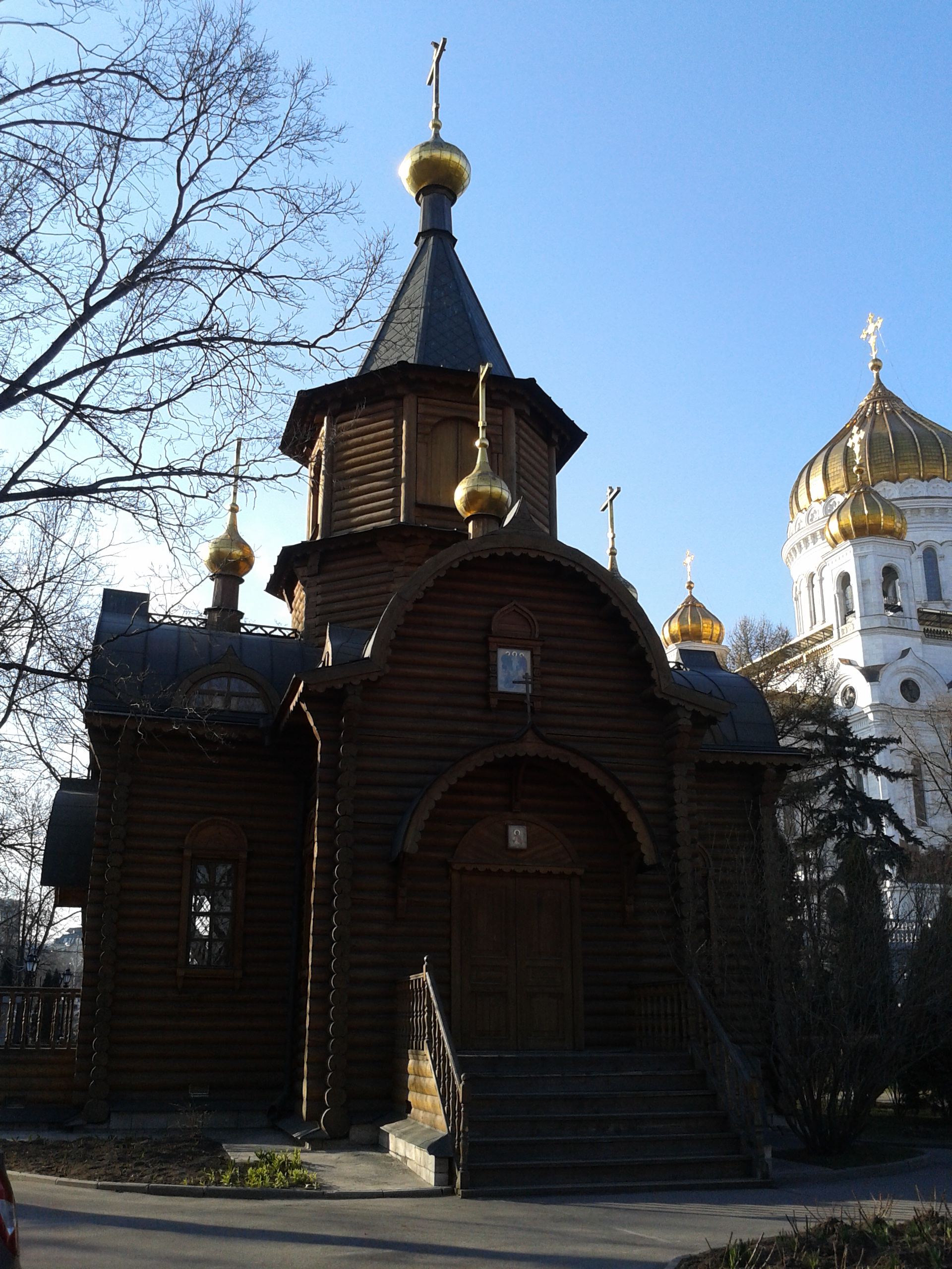 Храм Державной иконы Божией Матери и Храм Христа Спасителя, Москва